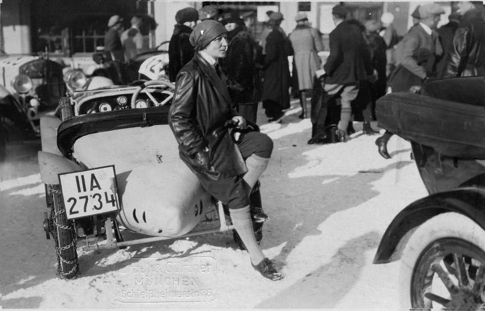 Hilda Wickenhäuser Mobil